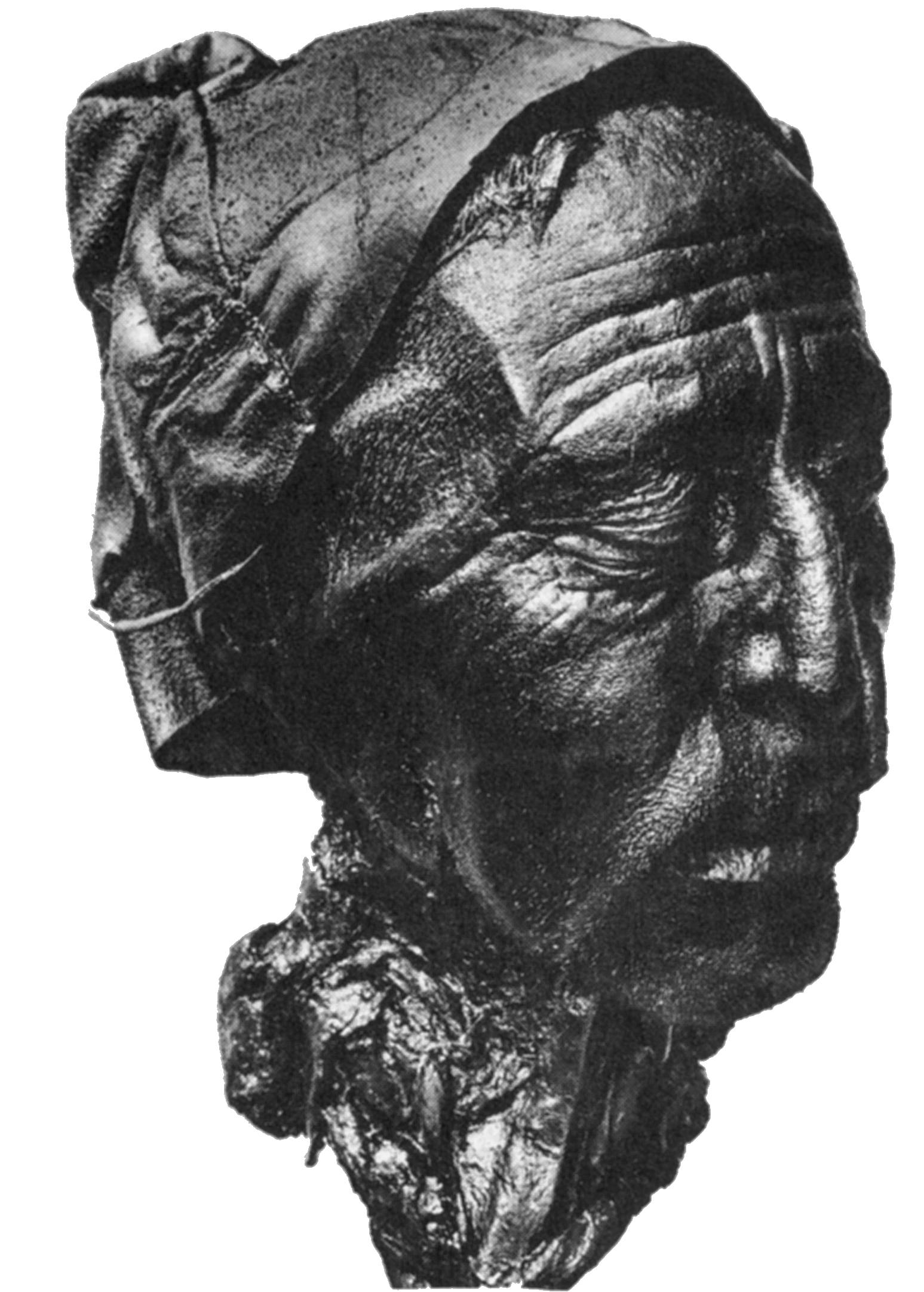 Moorleiche_von_Tollund_Jütland_um_100_n_Chr_hingerichtet